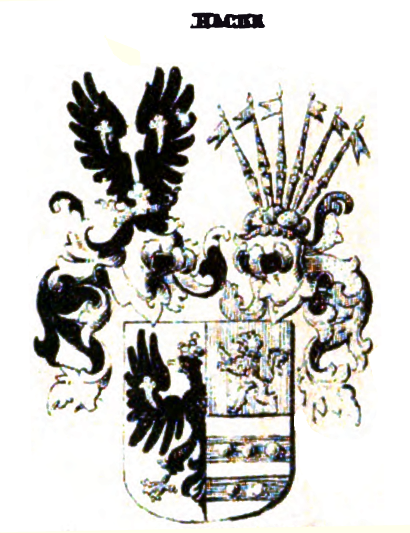 Wappen der Grafen von Hacke